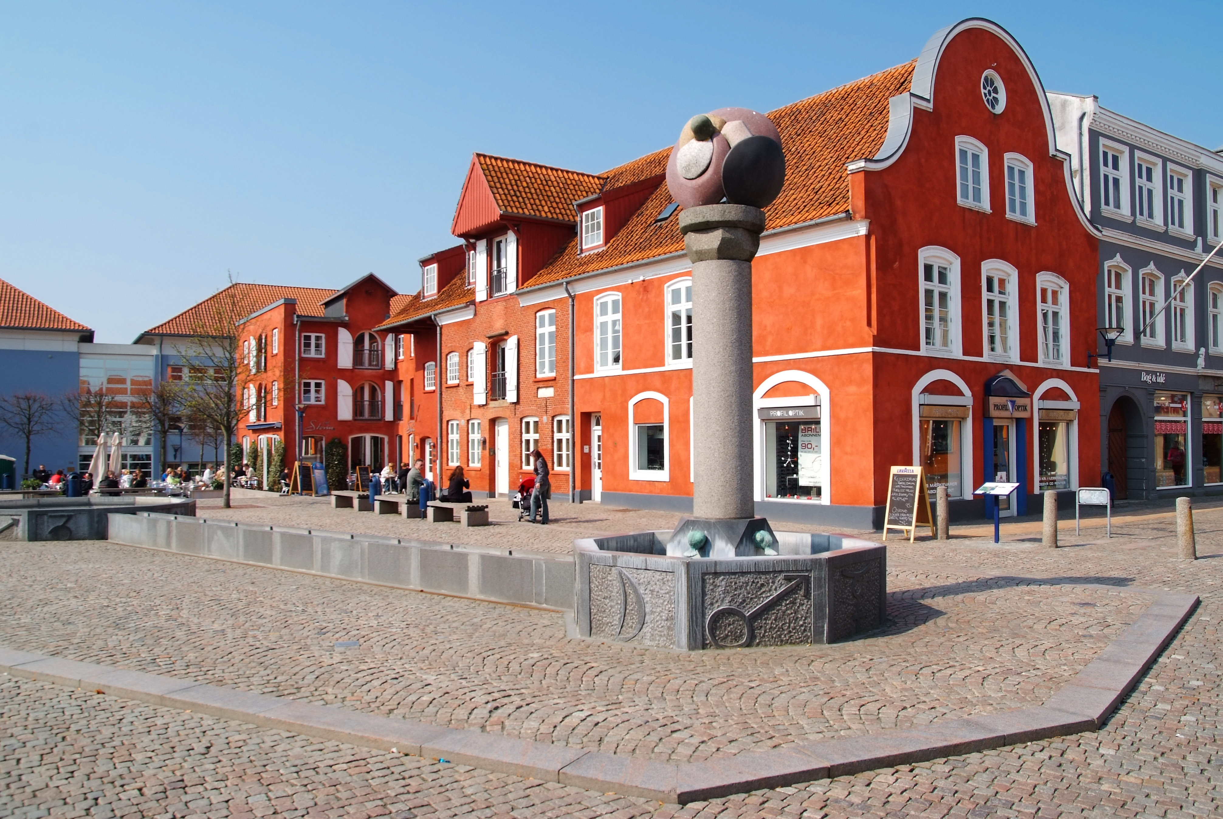 Market place of Aabenraa, Denmark